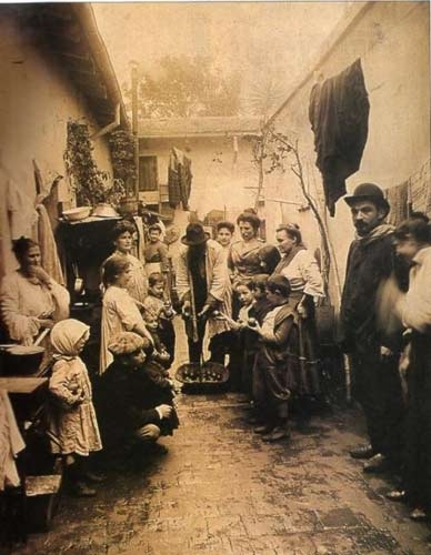 Vendedor de manzanas en Herreruela, provincia de Cáceres, España. Año 1852.